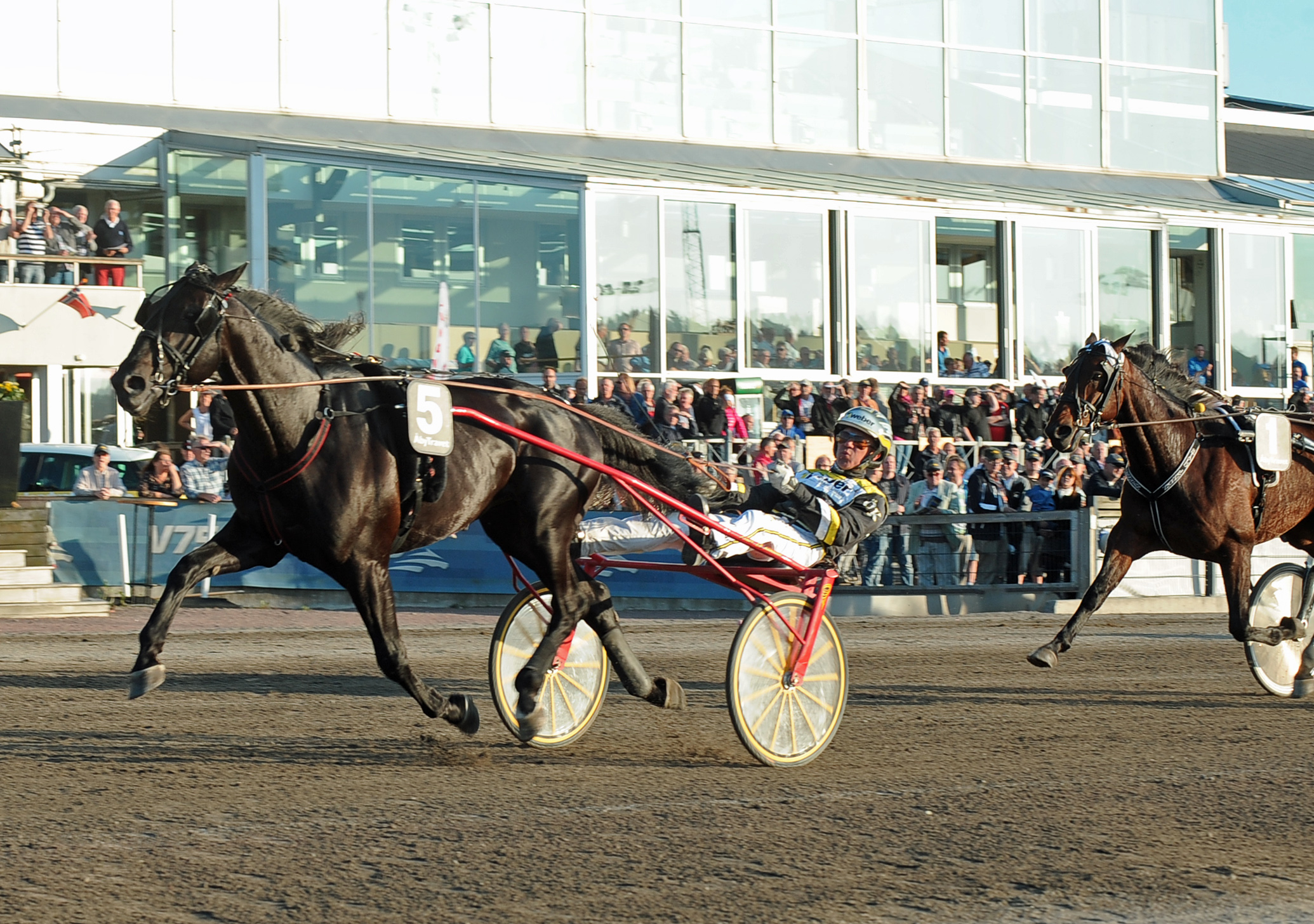 Travaren Magic Tonight och kusken Örjan Kihlström vinner ett lopp på Åbytravet.